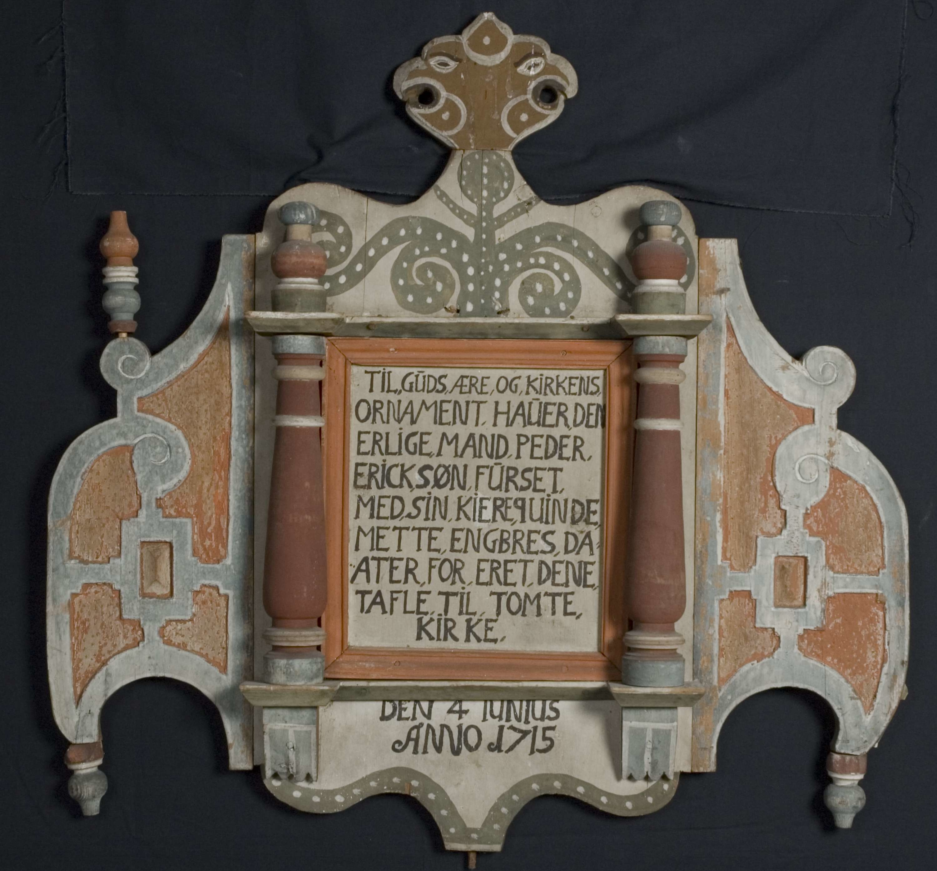 Epitafium fra 1715. Brukssted: Hedmark, Stange. Furu. Malt rød, hvit, ornamenter: grønt, hvitt, rødt, blått, gult. Malt med vannfarge. Bredde: 100 cmHøyde: 84 cm. Skåret tre, malt. Påskrift: TIL GUDS ÆRE OG KIRKENS ORNAMENT HAUER DEN ERLIGE MAND PEDER ERICKSØN FURSET MED SIN KIERE QUINDE METTE ENGBRESDAATER FOR ERET DENE TAFLE TIL TOMTE KIRKE DEN 4 JUNIUS ANNO 1715.